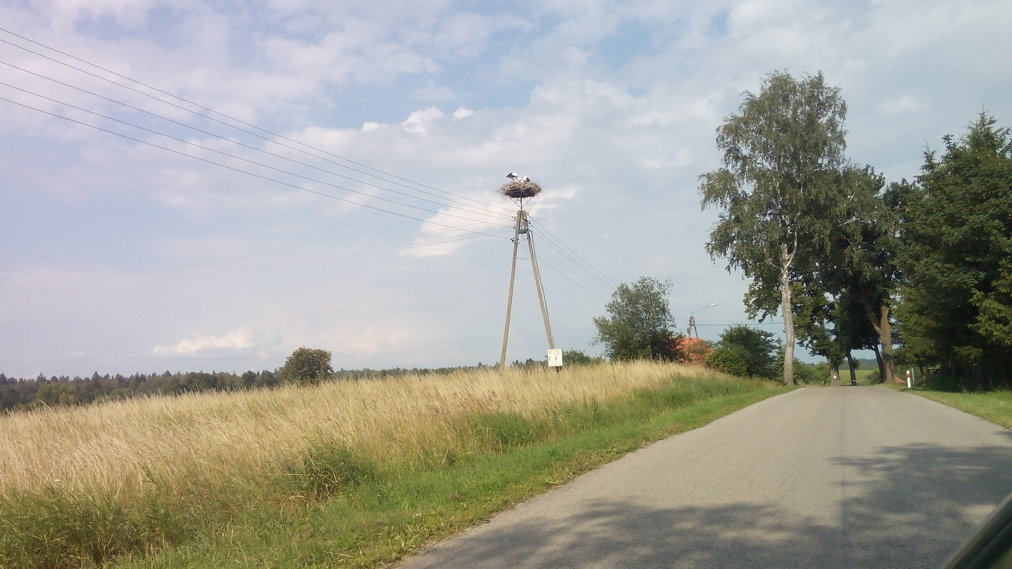 Gniazdo bociana białego znajdujące się we wsi Malinka